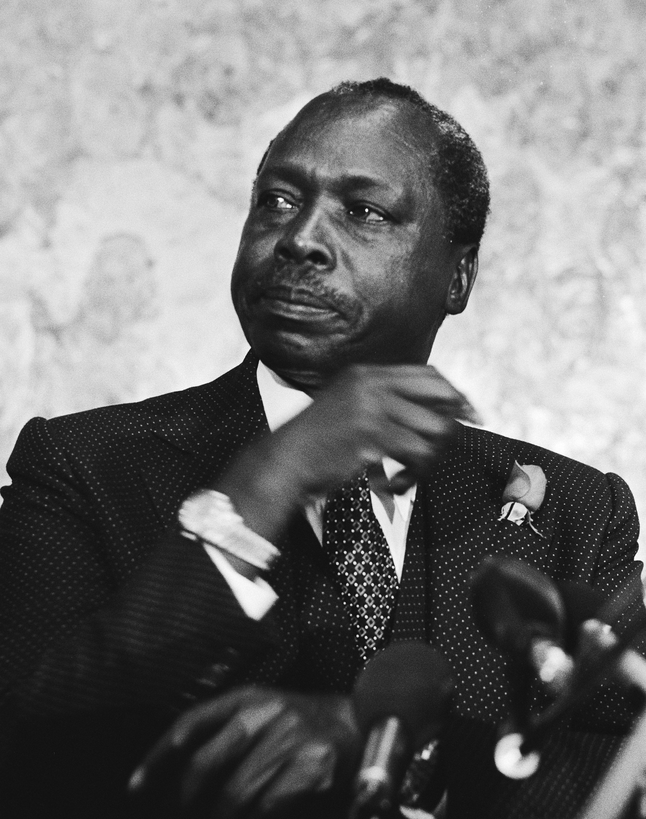 Persconferentie Kenyase president Daniel arap Moi in Den Haag